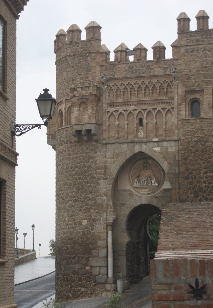 Puerta del Sol, Toledo, España. Arte mudéjar, 16 c. Gate of the Sun, Toledo, Spain. Mudejar